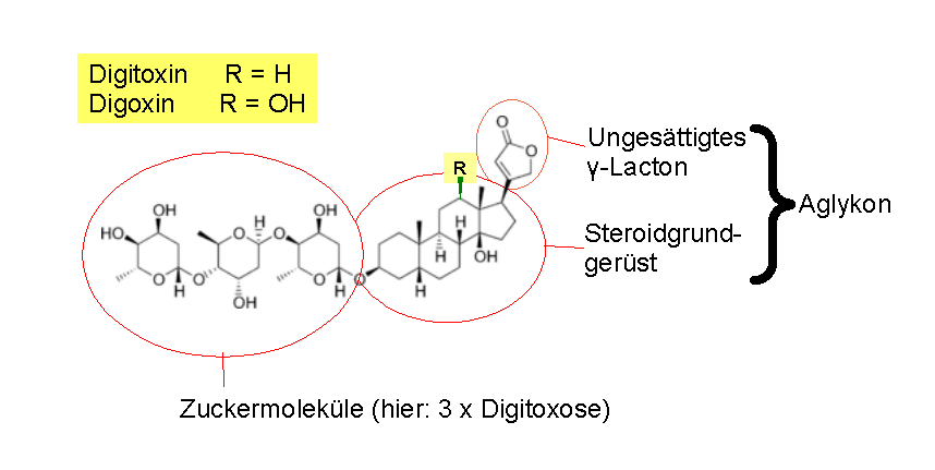 chemische Struktur der herzwirksamen Glykoside am Beispiel von Digoxin/Digitoxin